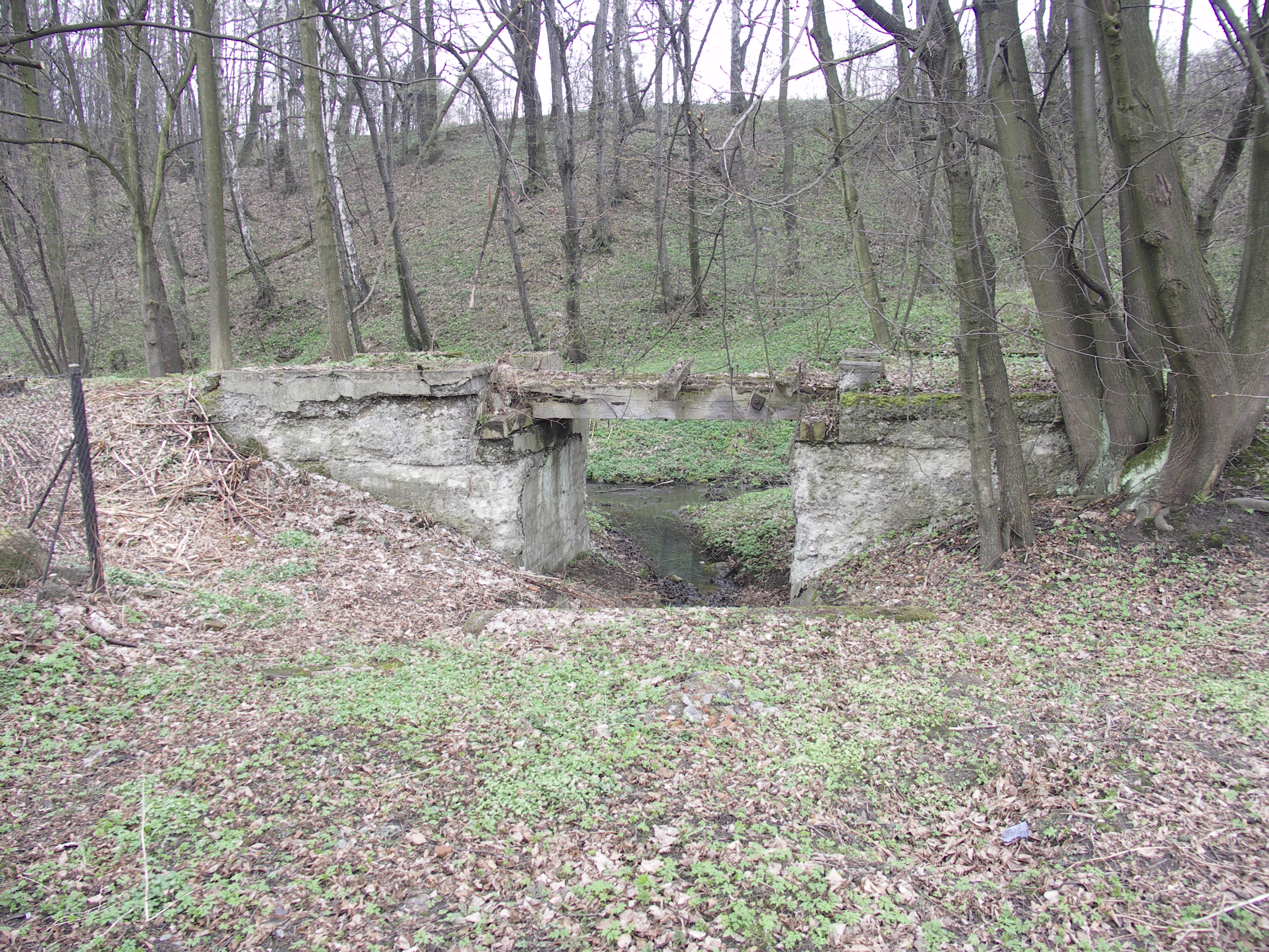 Můstek úzkorozchodné dráhy Ostrava-Karviná Petřvald u Fary Husitského sboru -- Úzkorozchodné dráhy na Ostravsku, Petřvald (okres Karviná)